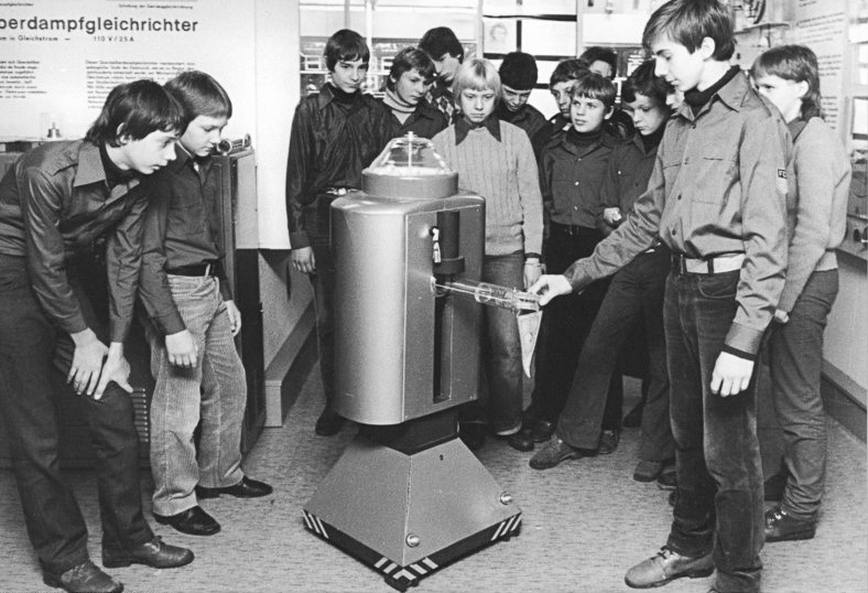 Schwerin, Jugendstunde im Polytechnischen Museum ADN-ZB Pätzold-8.12.82 Schwerin: Der erste Museumsroboter begrüßte Schüler einer achten Klasse aus Dobbertin im Polytechnischen Museum Schwerin. Die Teilnehmer einer Jugendstunde erlebten, wie der Roboter sich selbst und auch andere elektronische Funktionsmodelle erklärt und in Bewegung setzt.